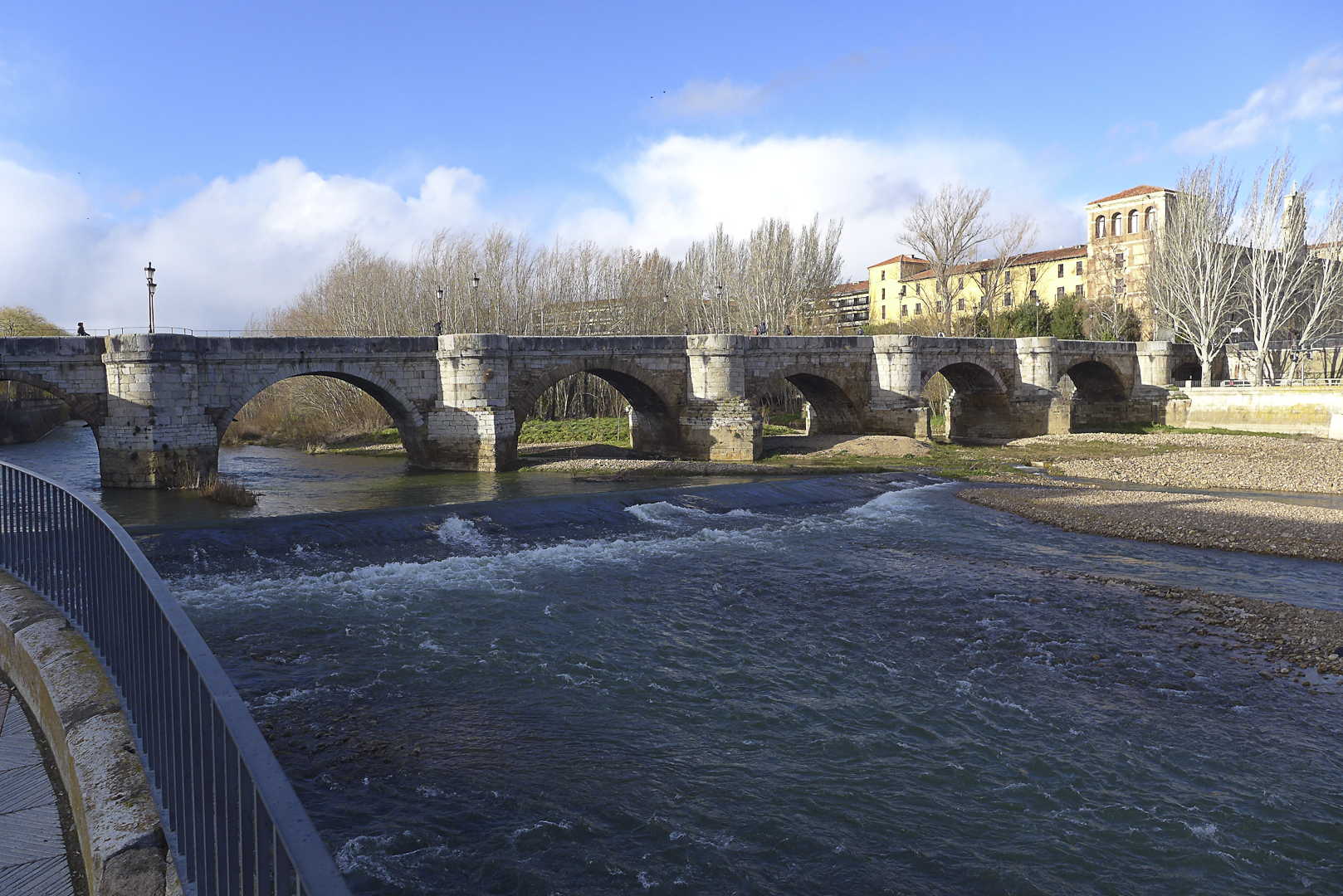 Spain-León-P1170154